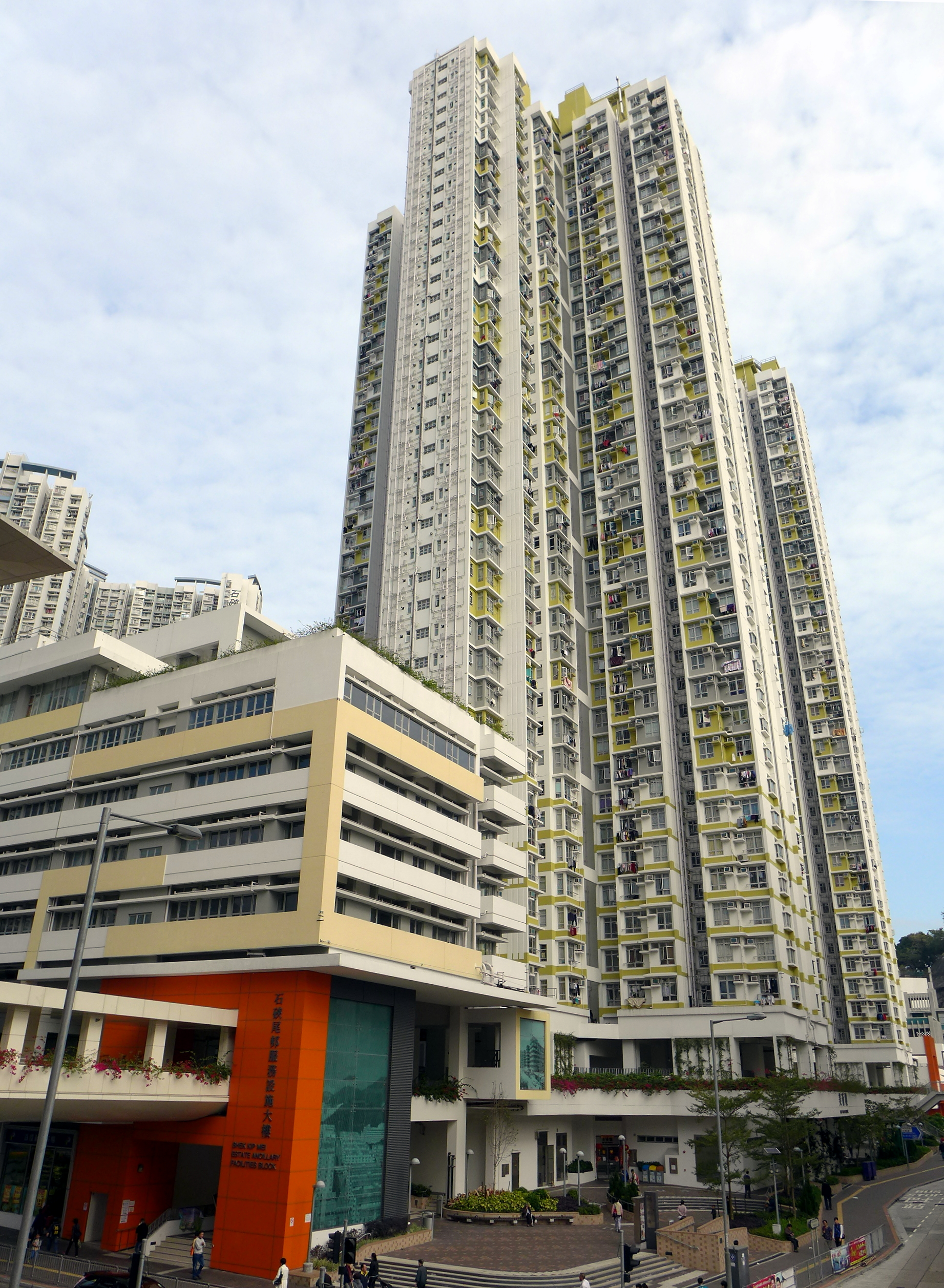 Shek Kip Mei Estate Phase 2